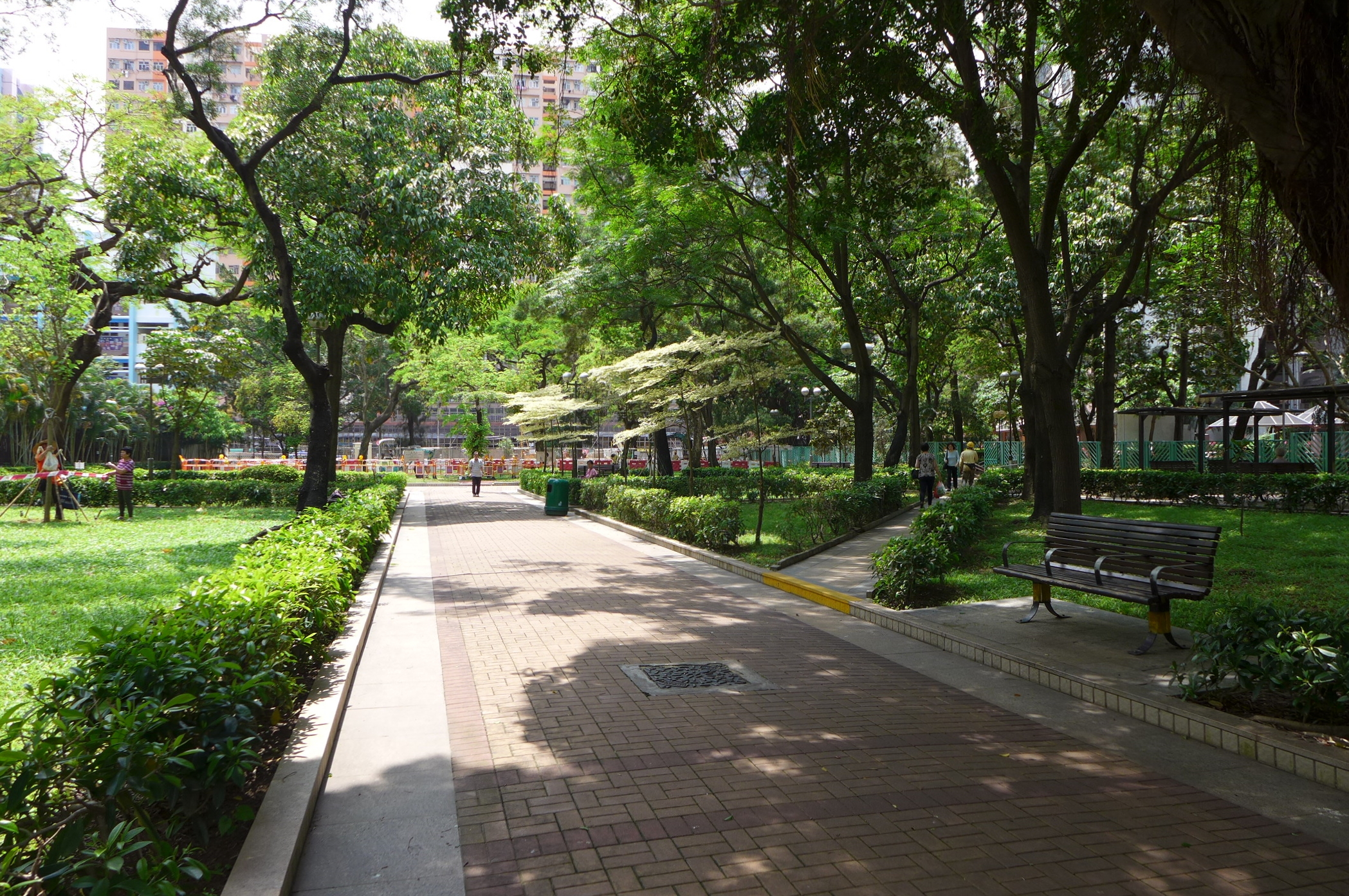 Morse Park No.1 View